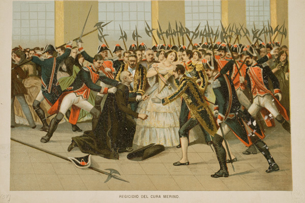 Estampa. Regicidio del Cura Merino.